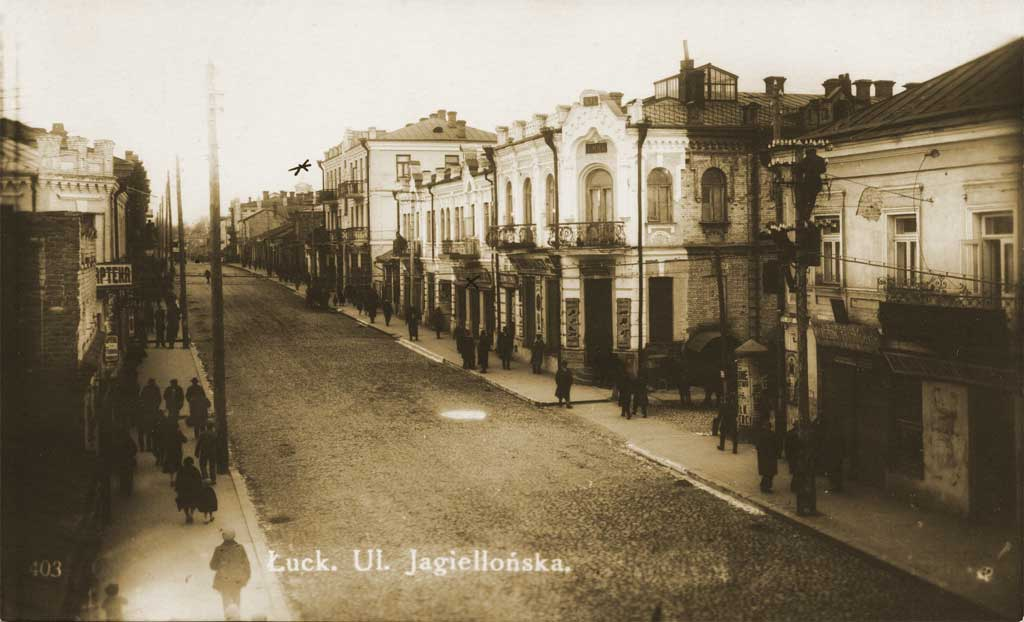 lesi ukrainky street, postcard